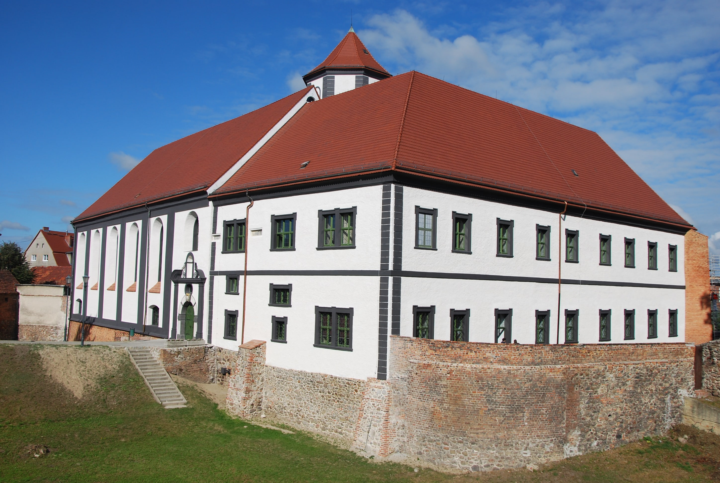 Zamek